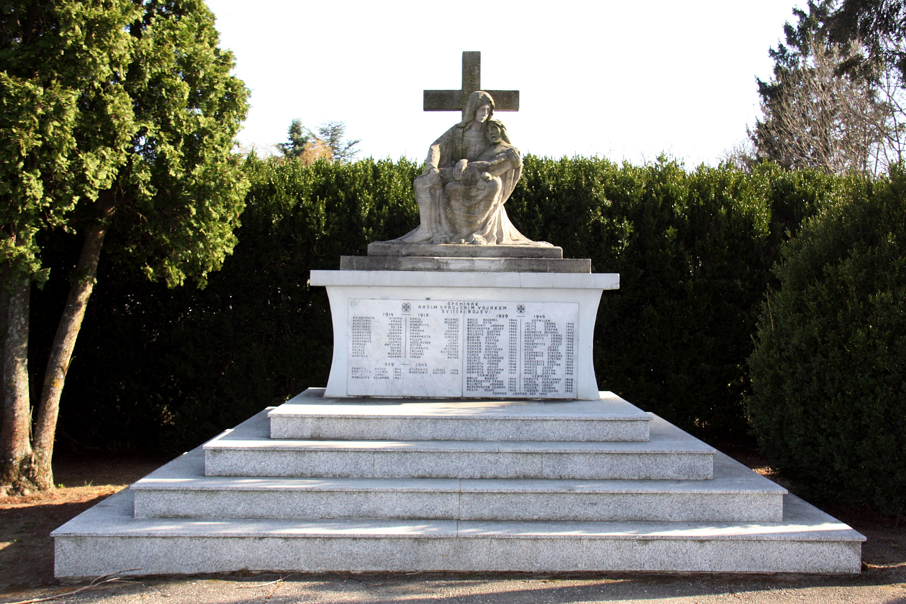 Schachendorf - Kriegerdenkmal auf Grundstück Nr. 193-2 in Dürnbach